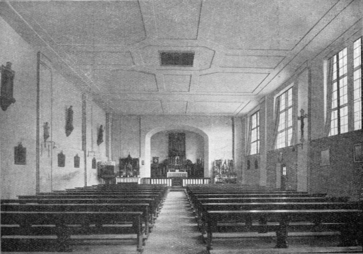 Innenraum der Notkirche St. Marien in Offenbach am Main, heutiger Mariensaal